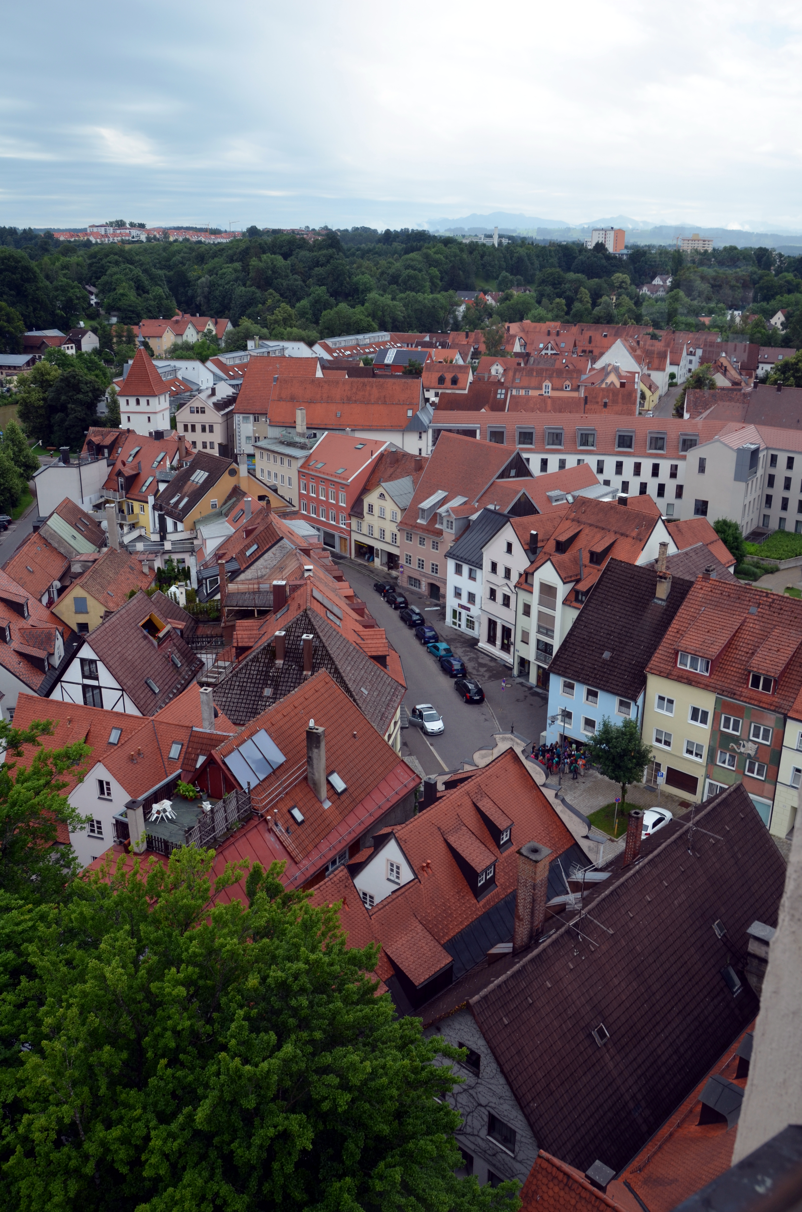 Bäckerstraße in Kempten (Allgäu), aufgenommen vom Kirchturm der St.-Mang-Kirche